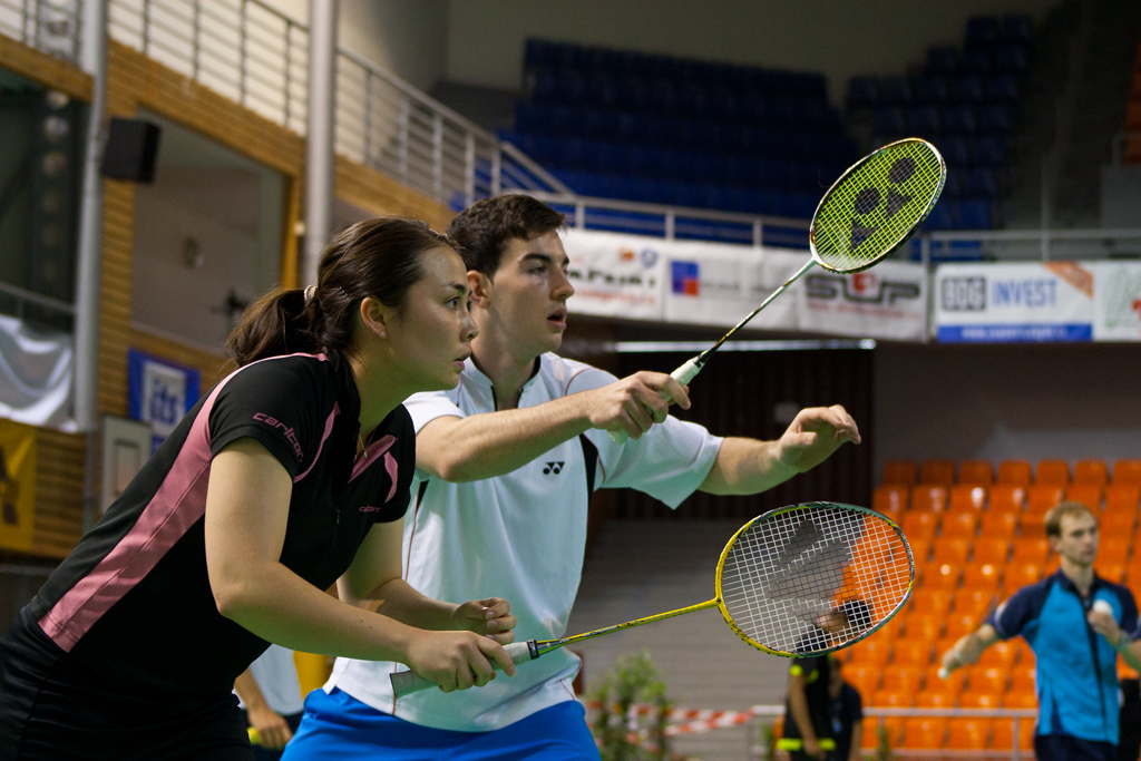 Mezinárodní mistrovství ČR v badmintonu